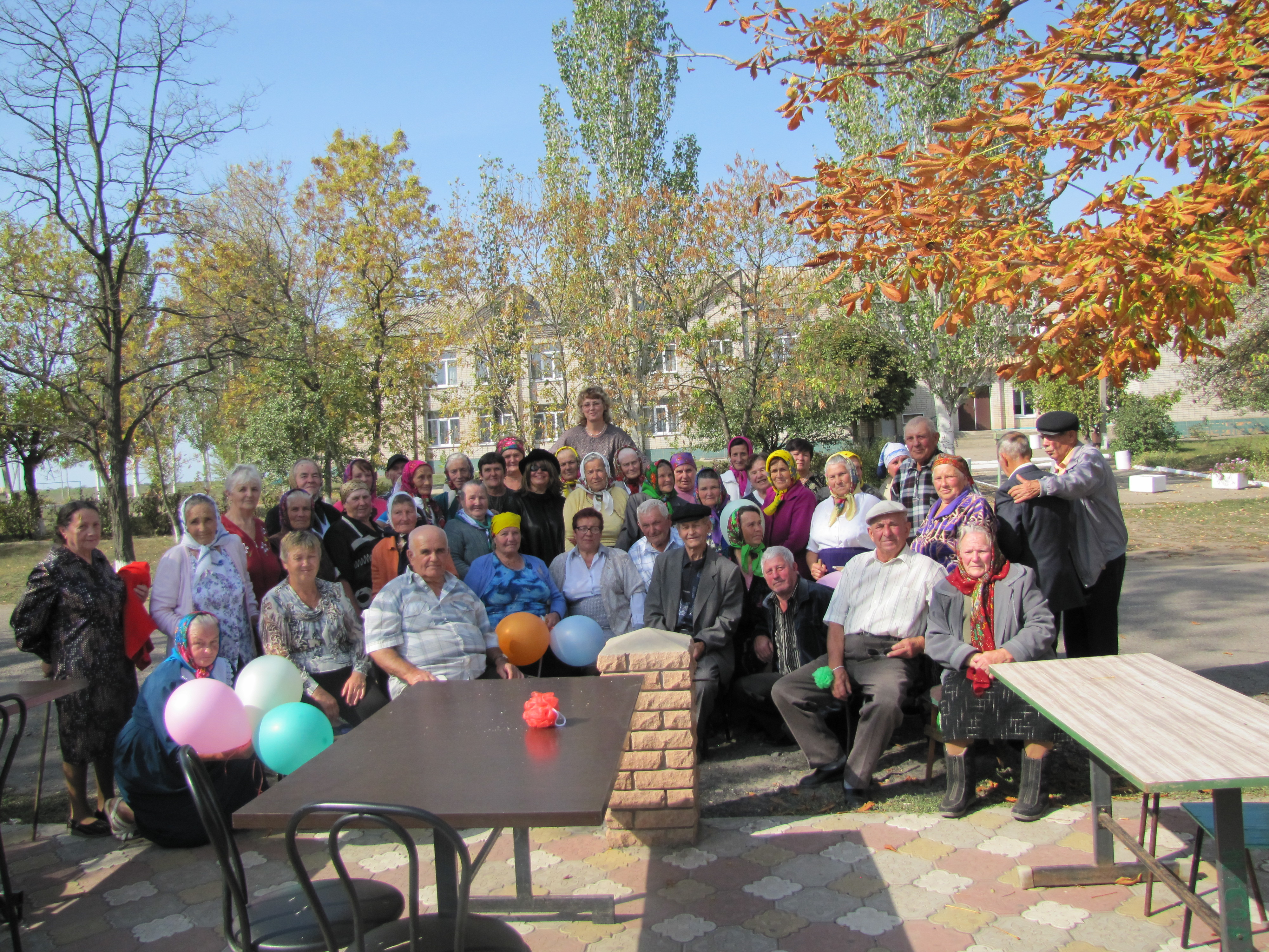 День похилого віку у с. Гюнівка У центрі колишній сільський голова Гуцуляк І.Г.